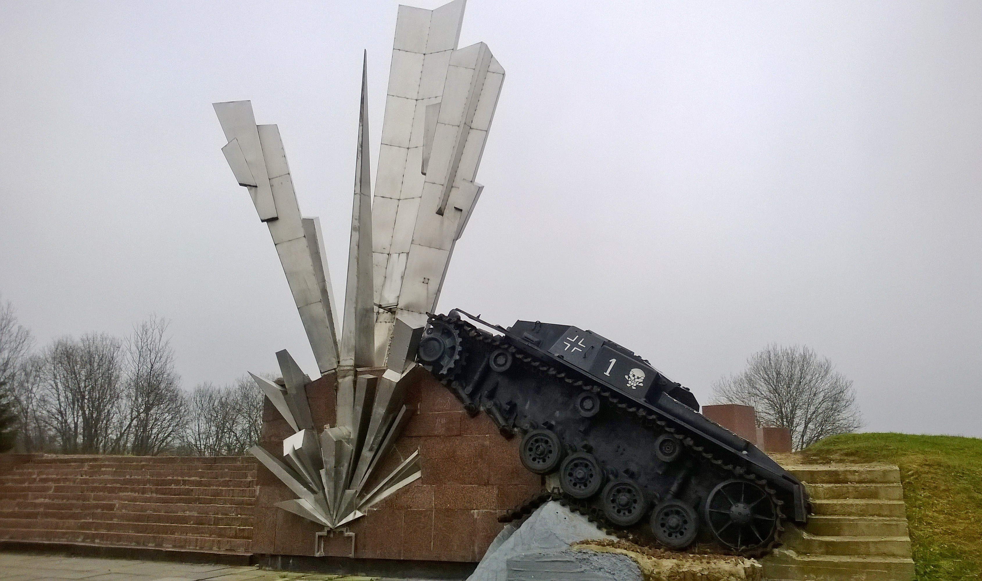 Памятный знак воинам-сапёрам Панфиловской дивизии. Установлен 31 октября 1981 года на 114-м километре Волоколамского шоссе Московской области